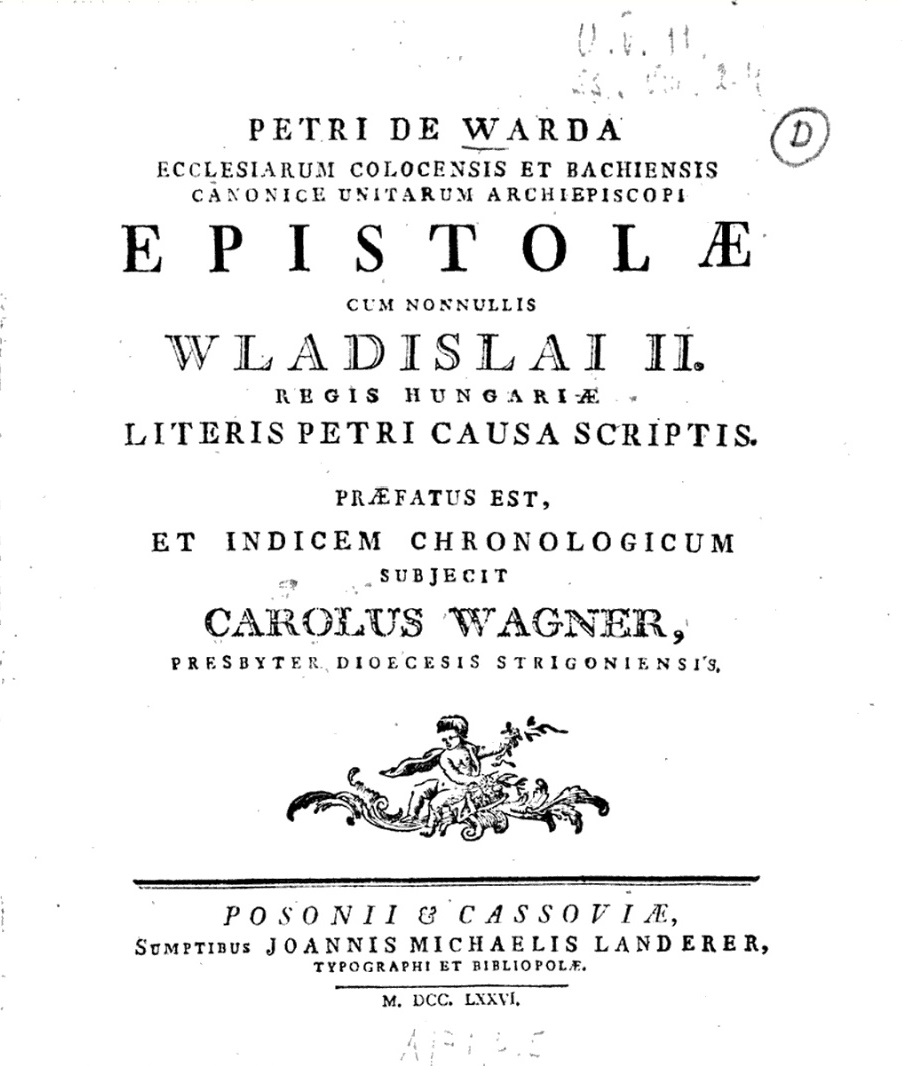 Váradi Péter (Adorján) (Várad, ? – 1501), kalocsai érsek, humanista író Petri de Warda, ecclesiarum Colocensis et Bachiensis canonice unitarum archiepiscopi epistulae cum nonnullis Wladislai II. regis Hungariae literis Petri causa scriptis című művének címlapja